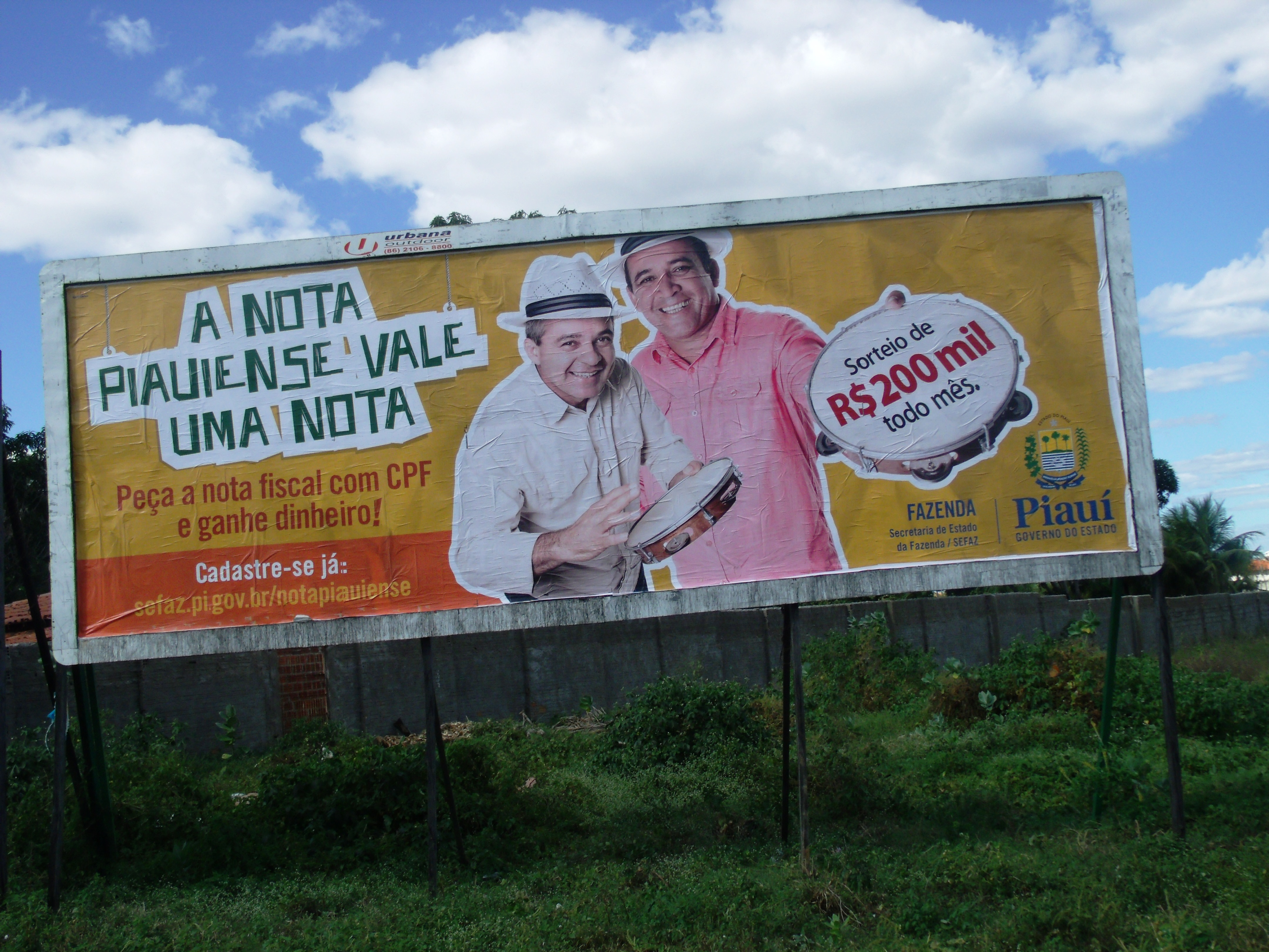 Placa, na margem da rodovia BR-343, com campanha d conscientização fiscal no Piauí, com os artistas Jotinha e Jotão.